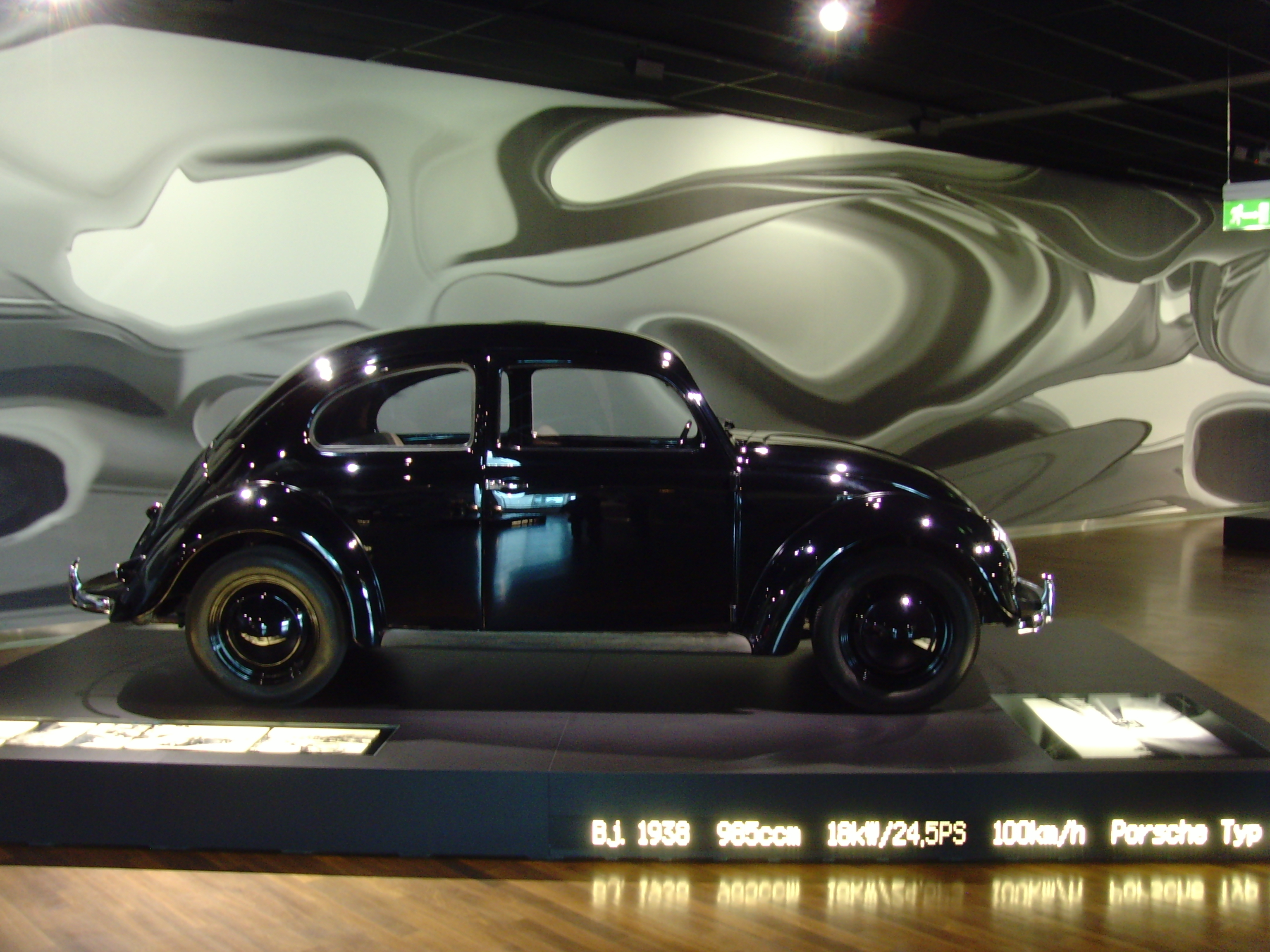 Autostadt Wolfsburg - ZeitHaus - Porsche 1938